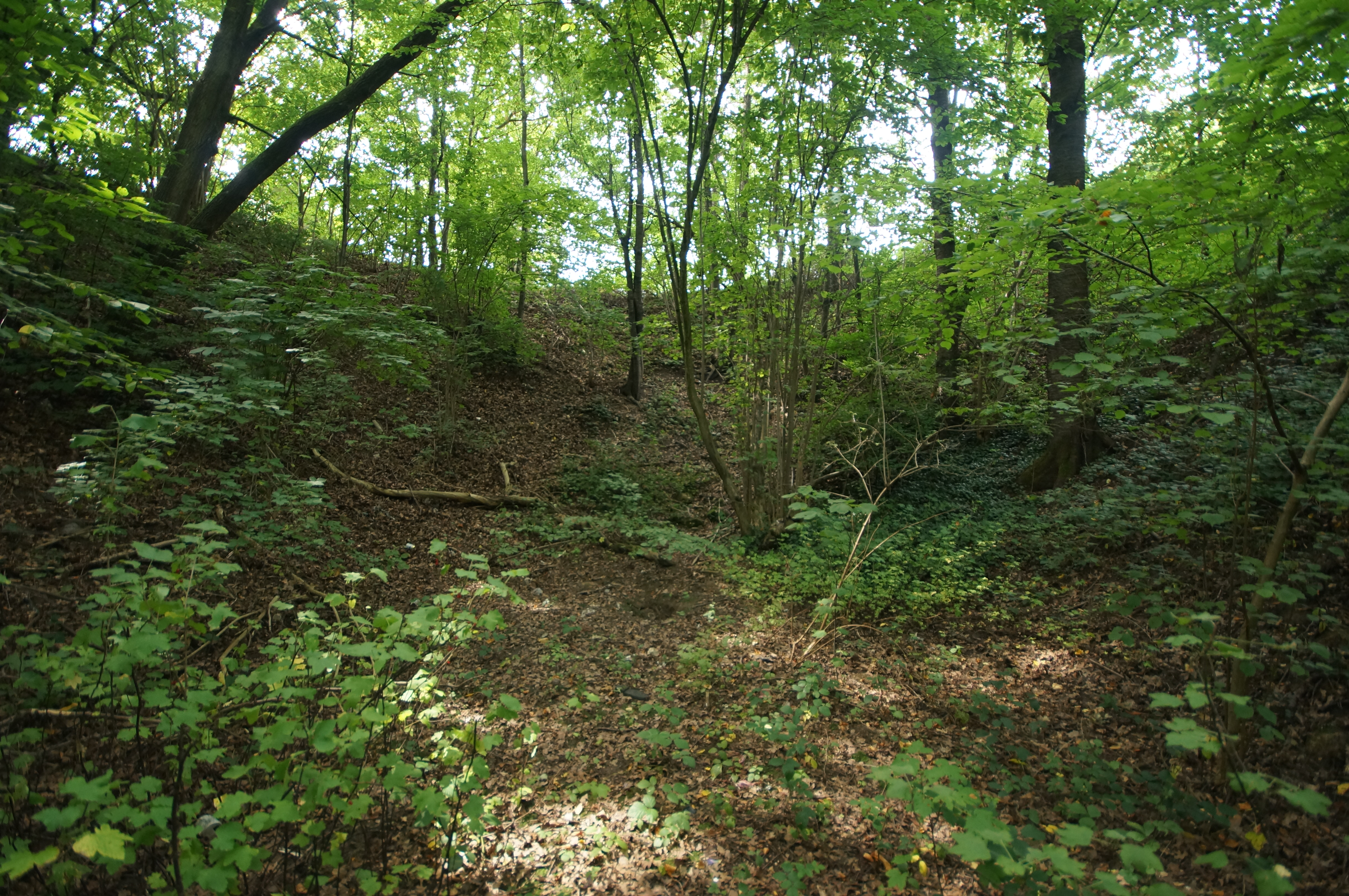 Doline in der Nähe des Ortsteils Keilberg, Regensburg Naturdenkmal, Geotop-Nr.: 362R004, Biotop-Nr.:X6938-52